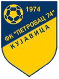 GRB FK KUJAVICA